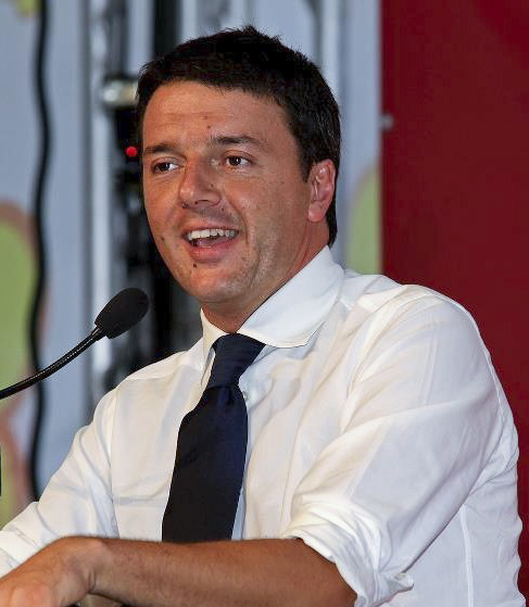 Il sindaco di Firenze Matteo Renzi interviene ad una conferenza nel 2012.